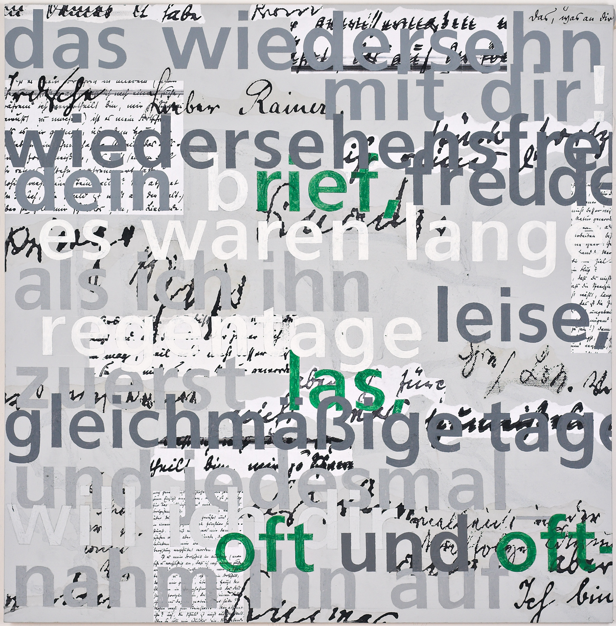 Sonia Jakuschewa, Dopisy pro Lou IIc, 2005-2007 (Hommage a Rainer Maria Rilke), 130 x 130 cm, foto Bernd Perlbach